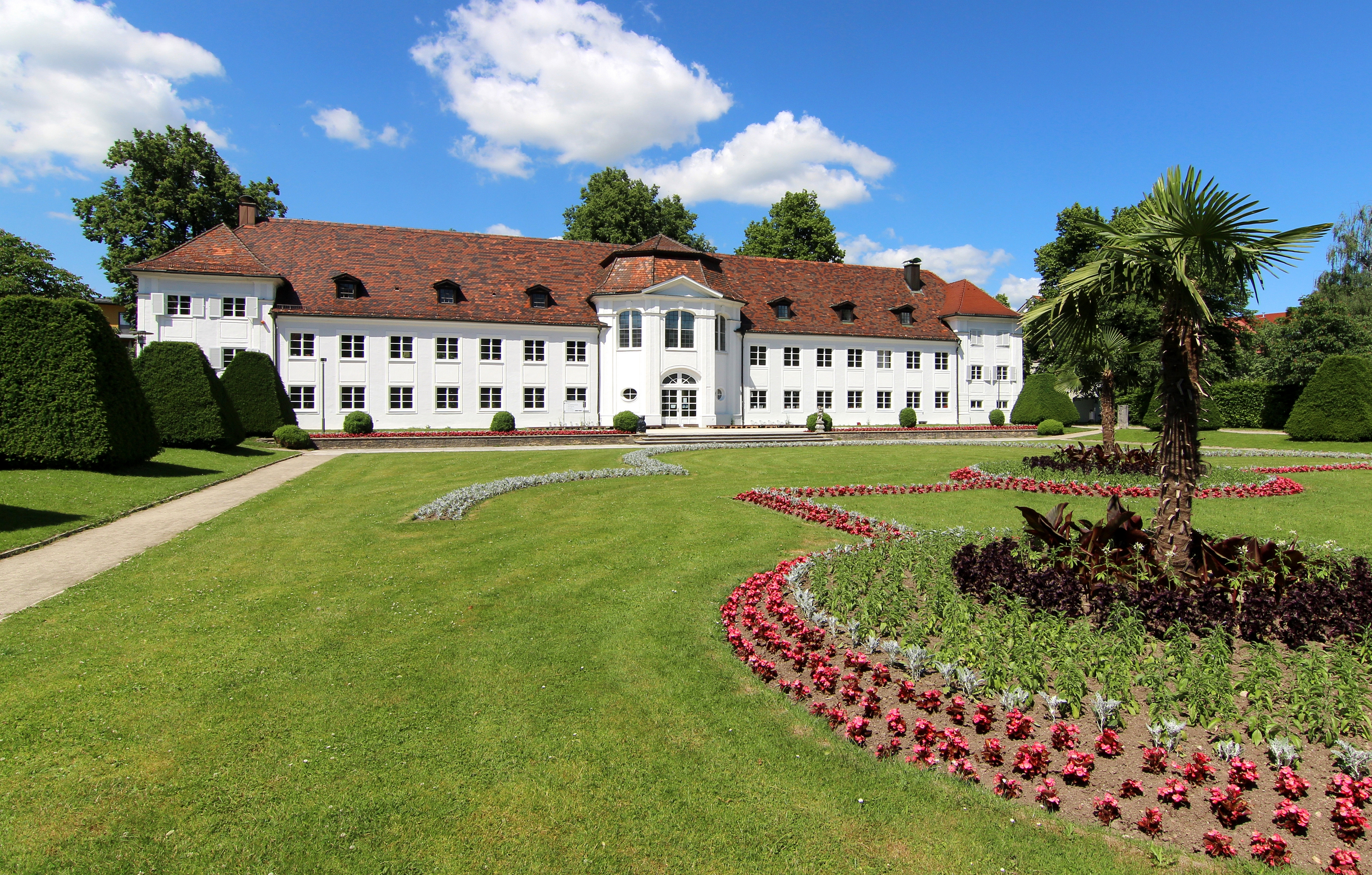 Die Orangerie im Hofgarten, Kempten